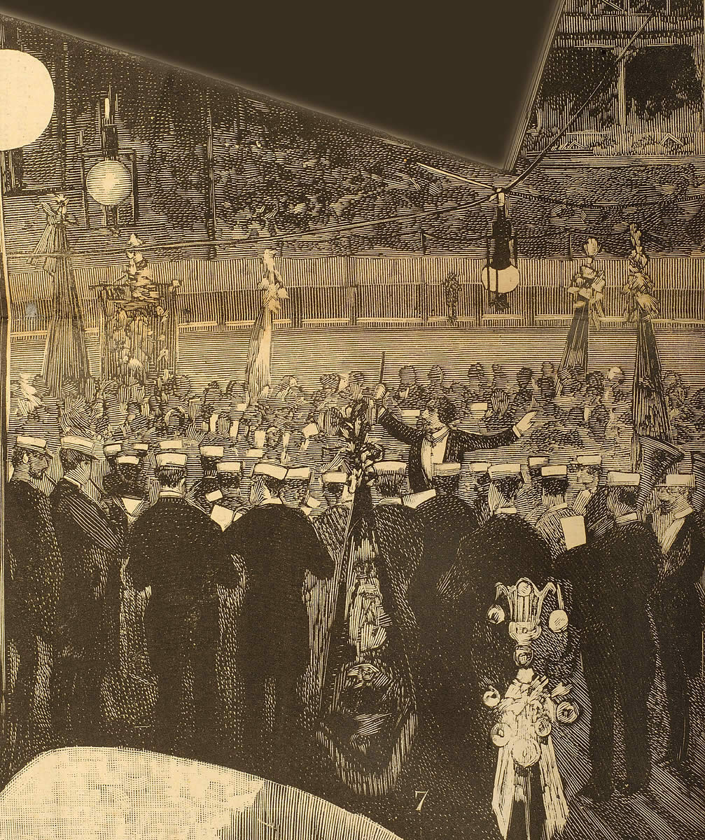 Fêtes à Saint Sébastien : grand concours international d’orphéons, fanfares et musiques, organisé les 29 et 30 août : exécution de l’hymne de la patrie par tous les orphéons, placés sous la direction du maître Laurent de Rillé Publié dans La ilustración española y americana, 8 septembre 1886. "... l’hymne national fut joué lors du festival du 29 au soir par tous les orphéons français et espagnols, accompagnés par les musiques de Bordeaux, sous la direction de l’illustre maître Arban".